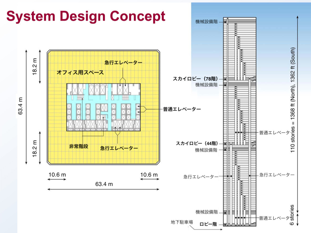 File:World Trade Center Building Design with Floor and Elevator Arrangment.jpgの改変作品（日本語化）